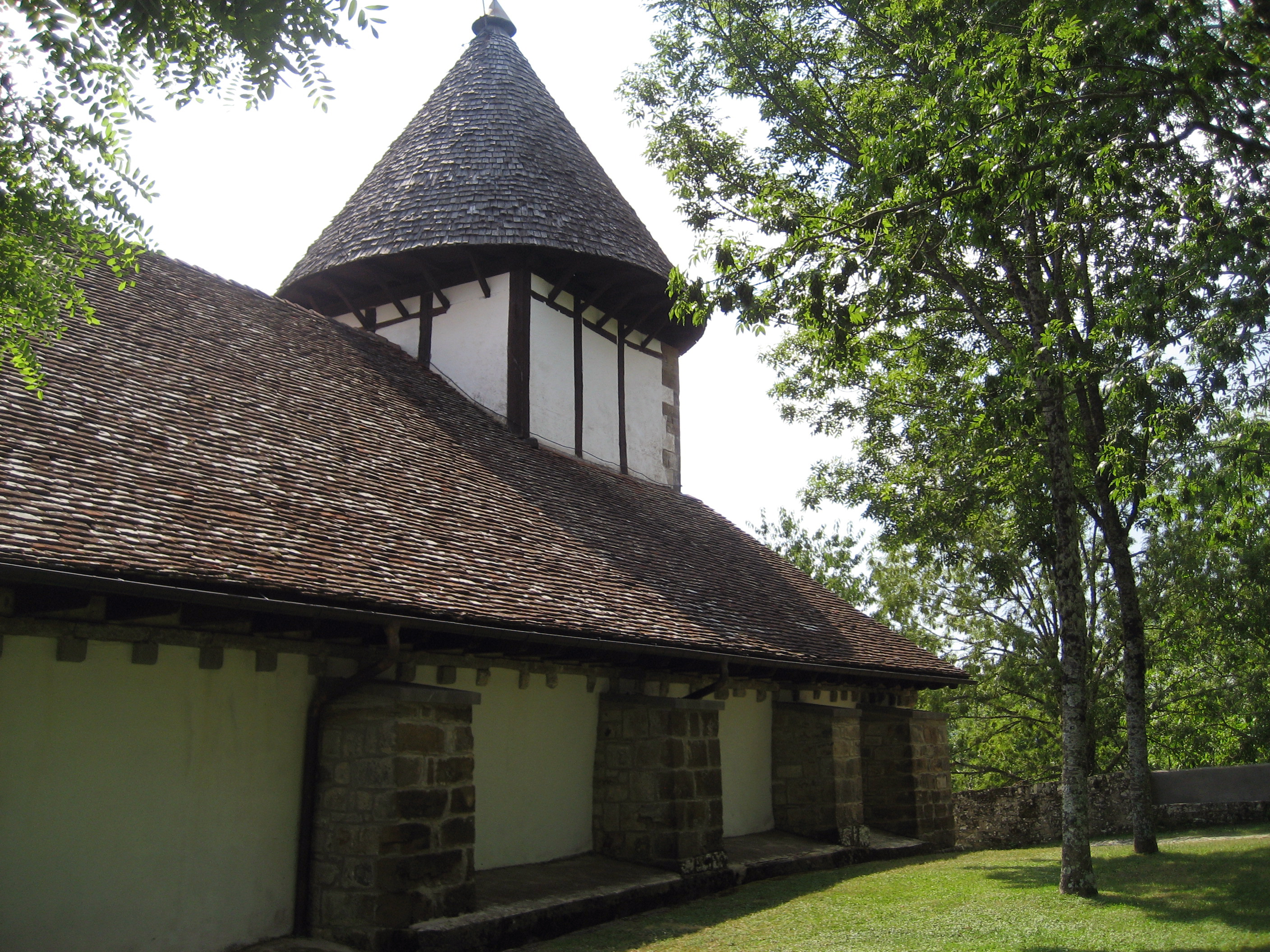 Ermita de Nuestra Señora de Muskilda Ocxhagavía Navarra Spain